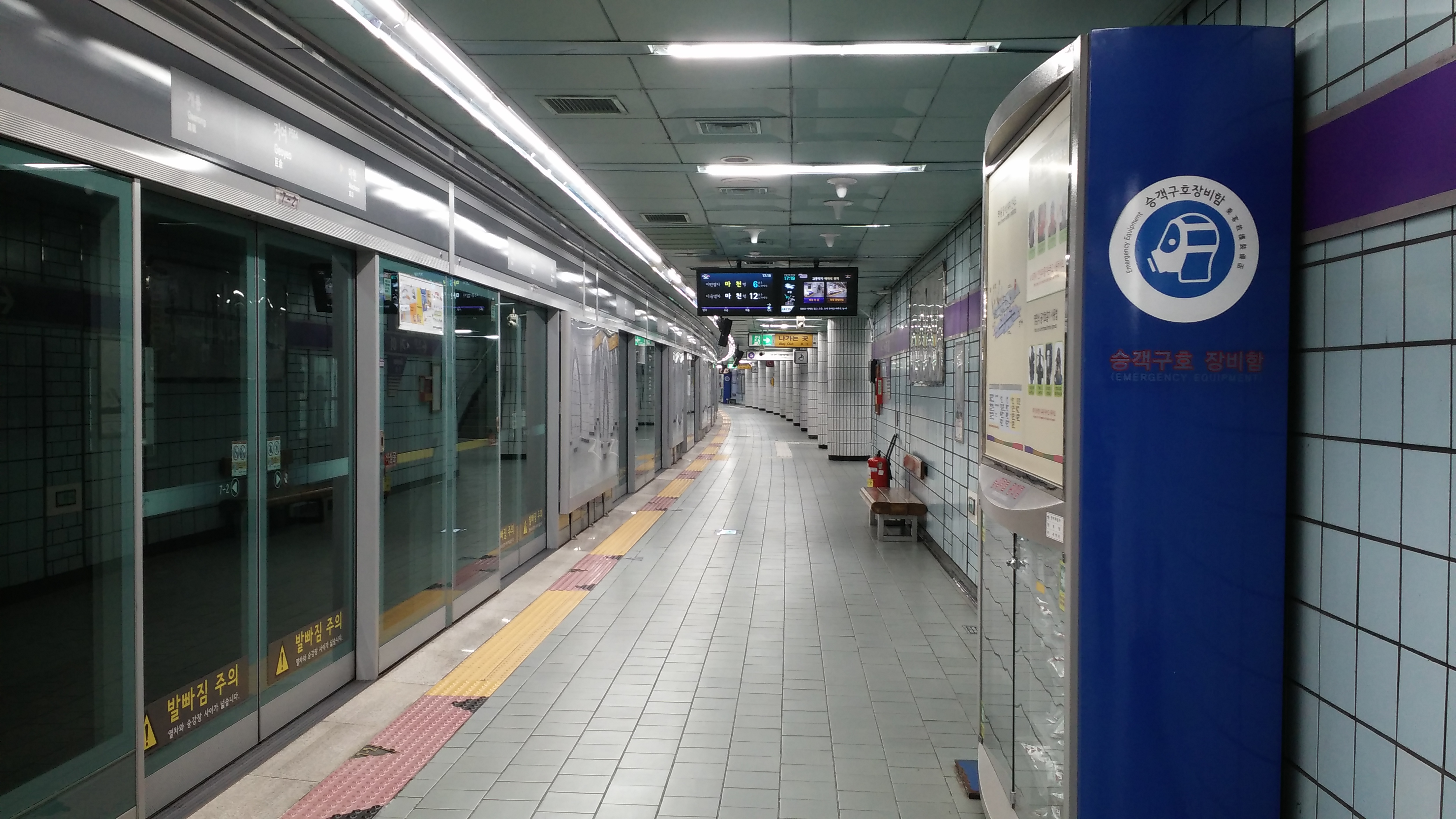 거여역 승강장